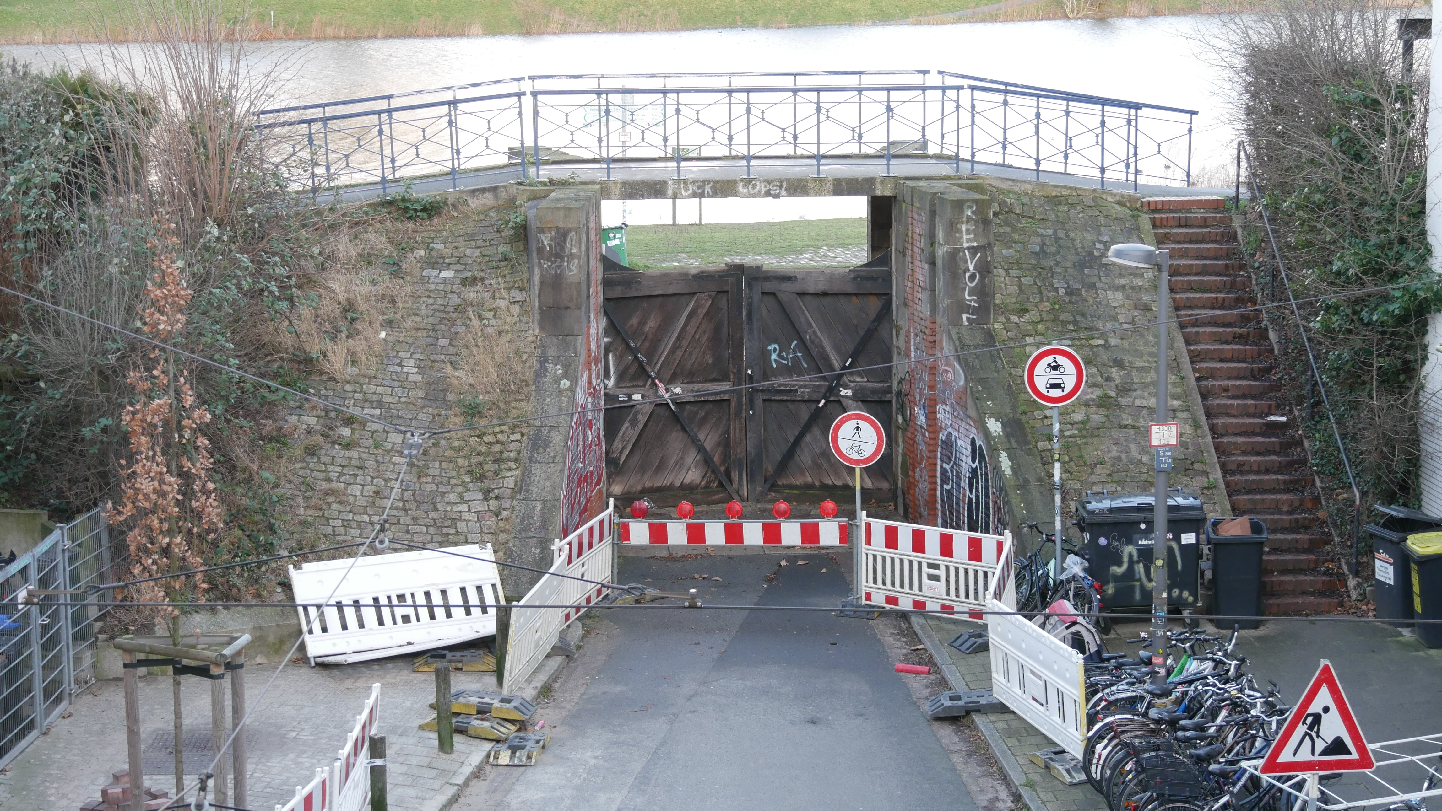 Deichschart am Habenhauser Deich zum Buntentorsteinweg mit Blick auf den Stadtwerder, Tor geschlossen wegen Sturmtief Sabine.